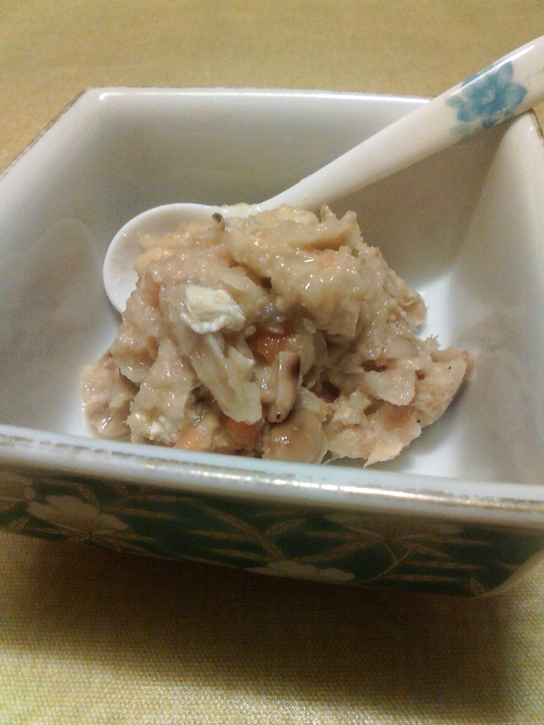 しもつかれ, Shimotsukare, 下野家例